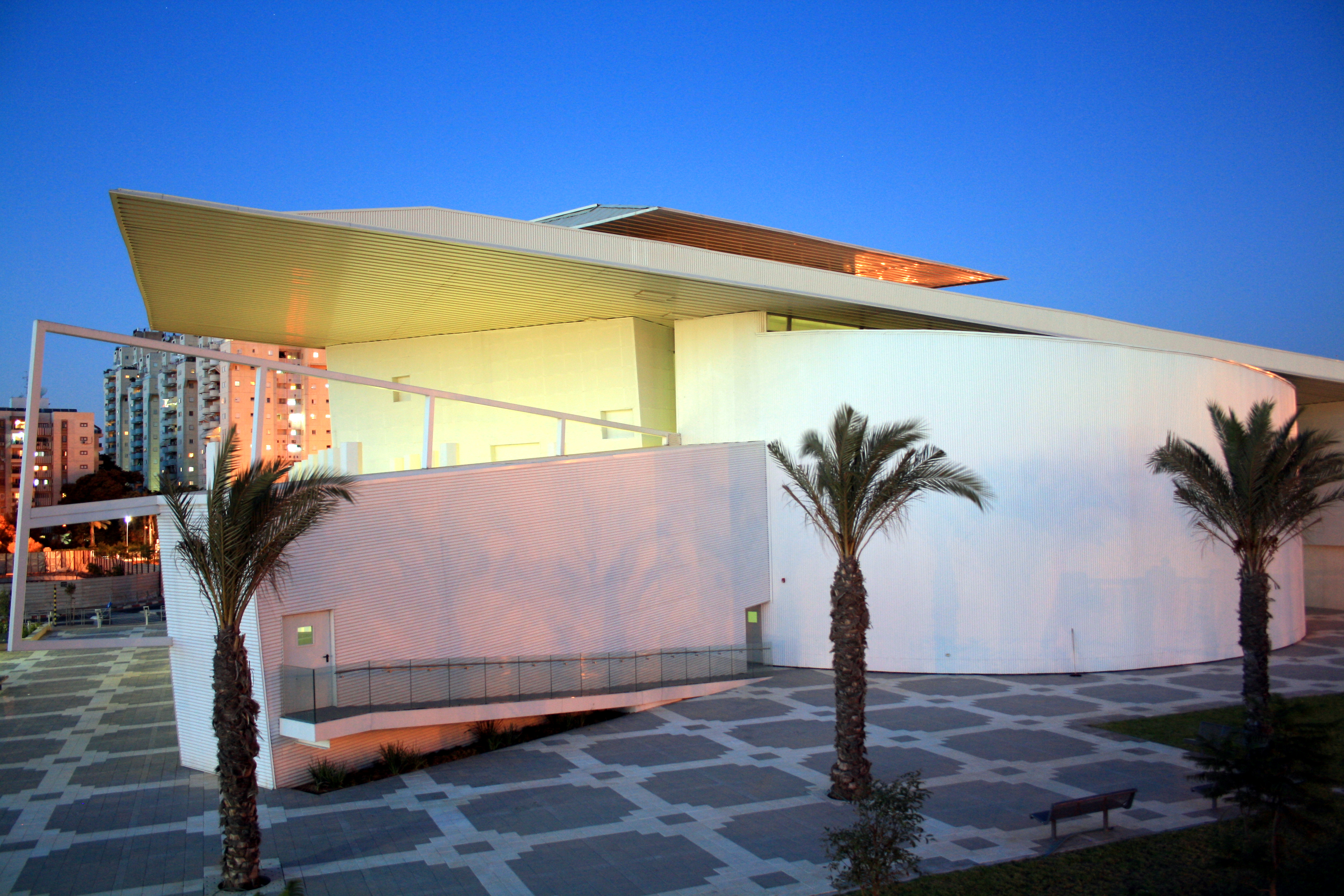 מוזיאון יעקב אגם לאמנות, ראשון לציון.